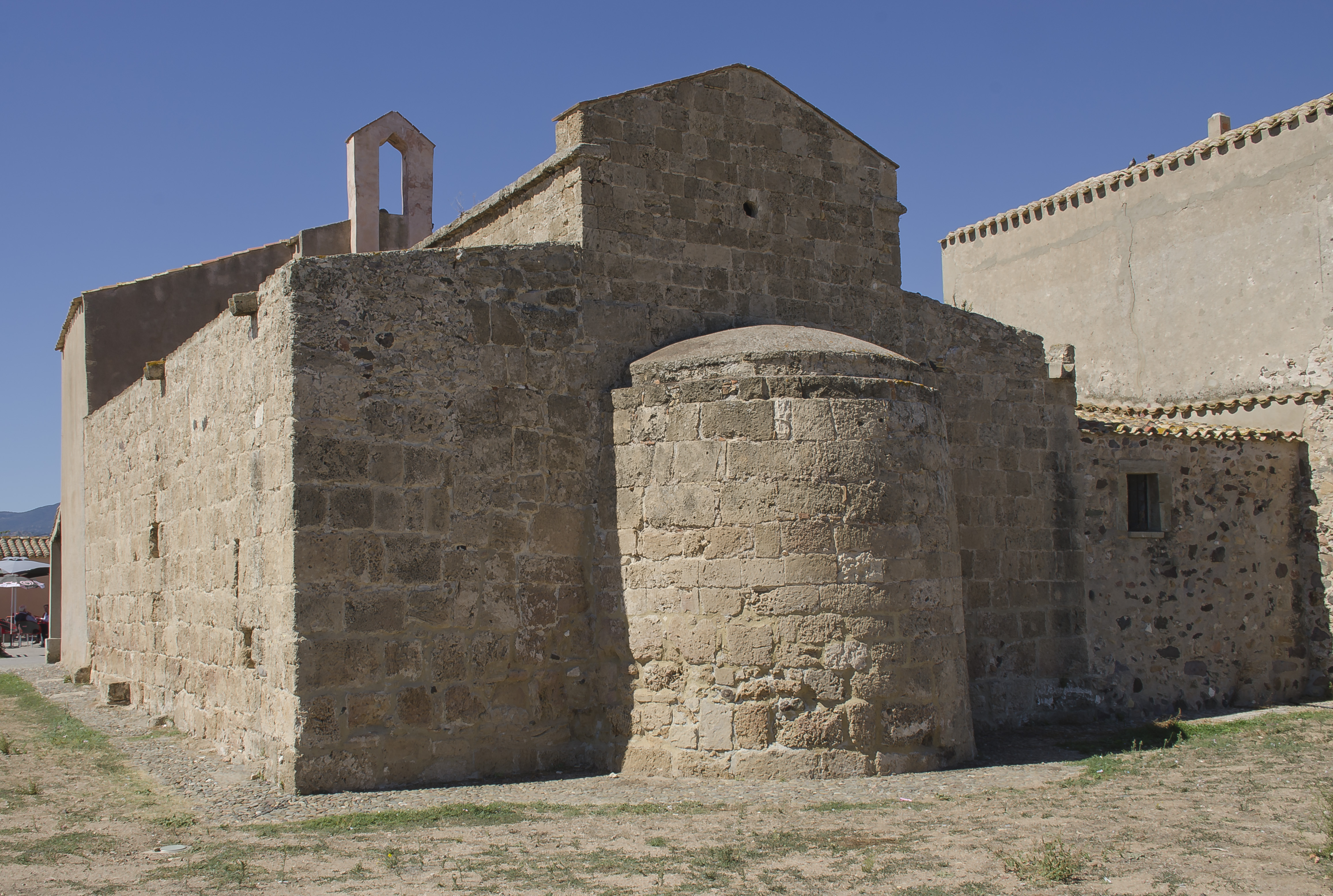 Chiesa di Sant'Efisio, Nora, Sardinien